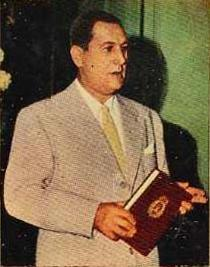 Fotografía coloreada del presidente de la República Argentina Juan Domingo Perón con la versión de la Constitución Nacional reformada en 1949 en sus manos. La Constitución de 1949 fue revocada en el año 1957.